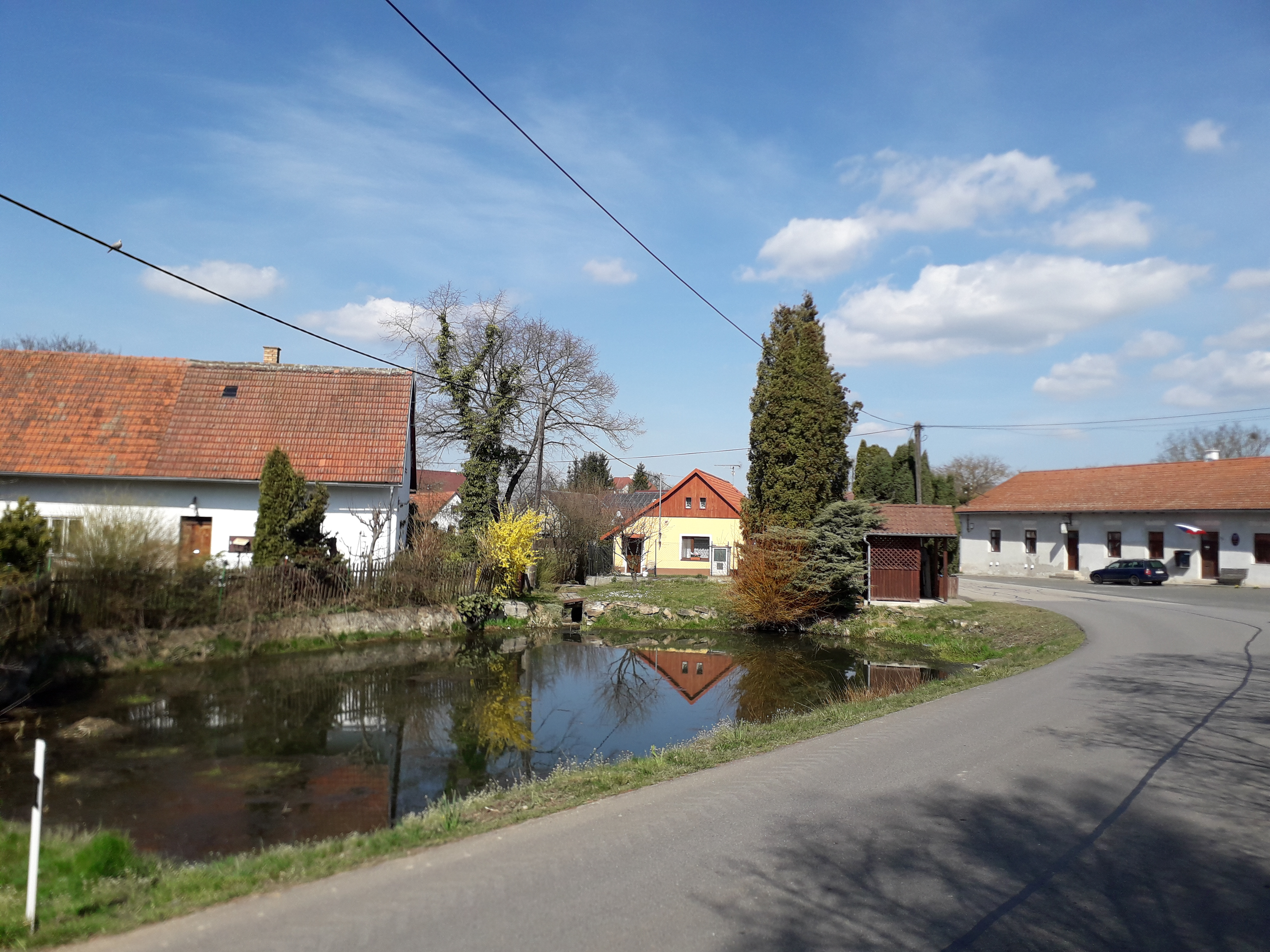 náves a rybníček